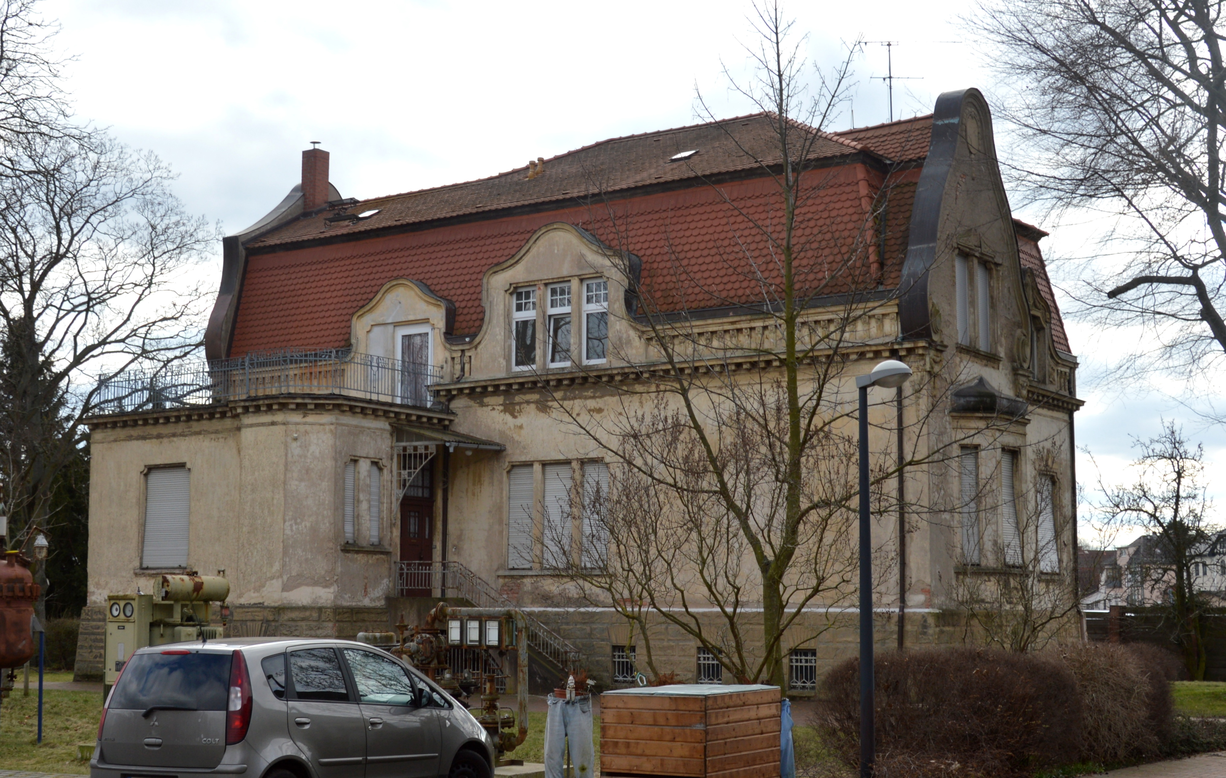 Villa am Umspannwerk Schönebeck